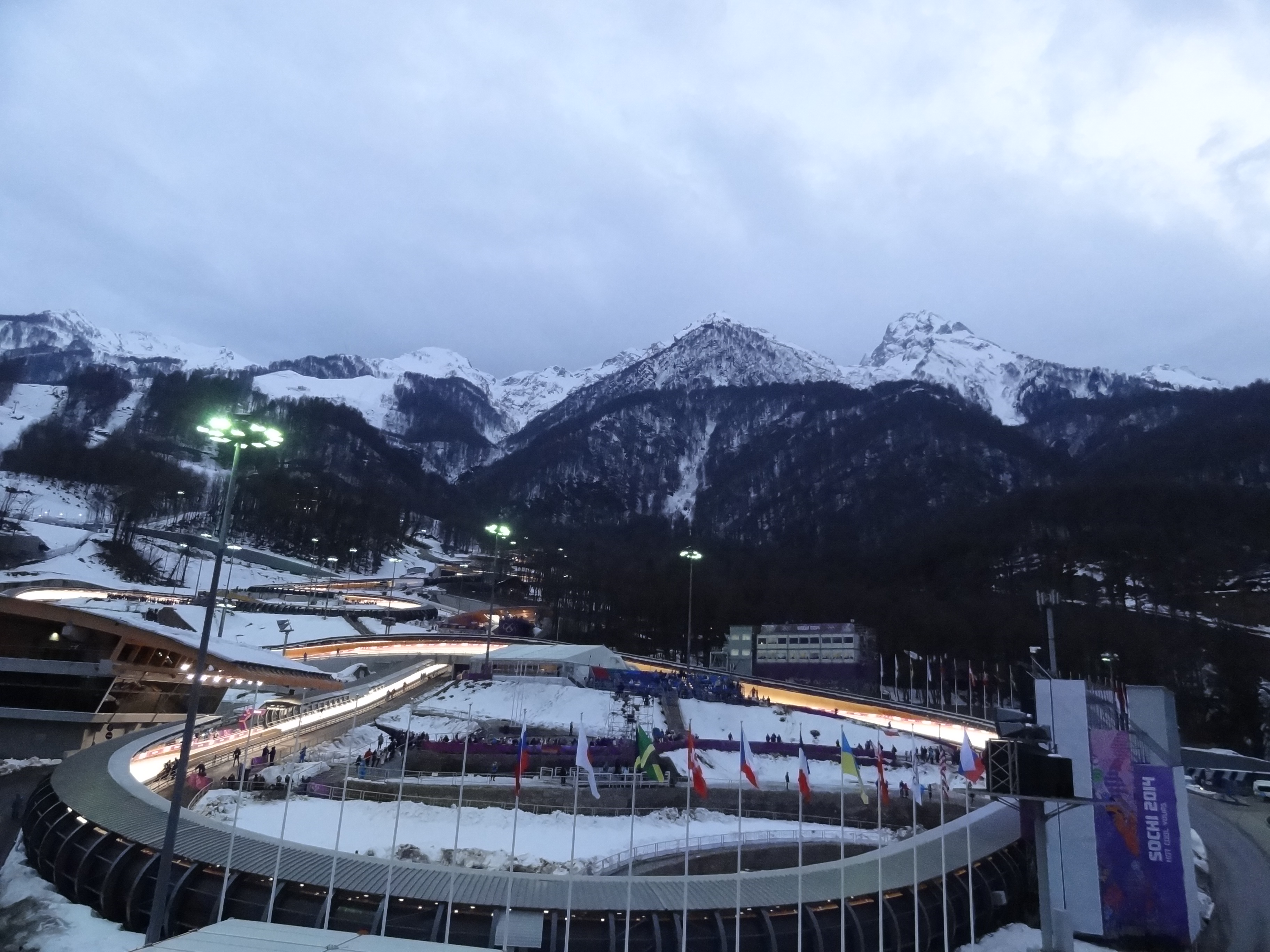 Сочи. Центр санного спорта Санки. Координаты: 43.66769, 40.29106 Горный кластер.